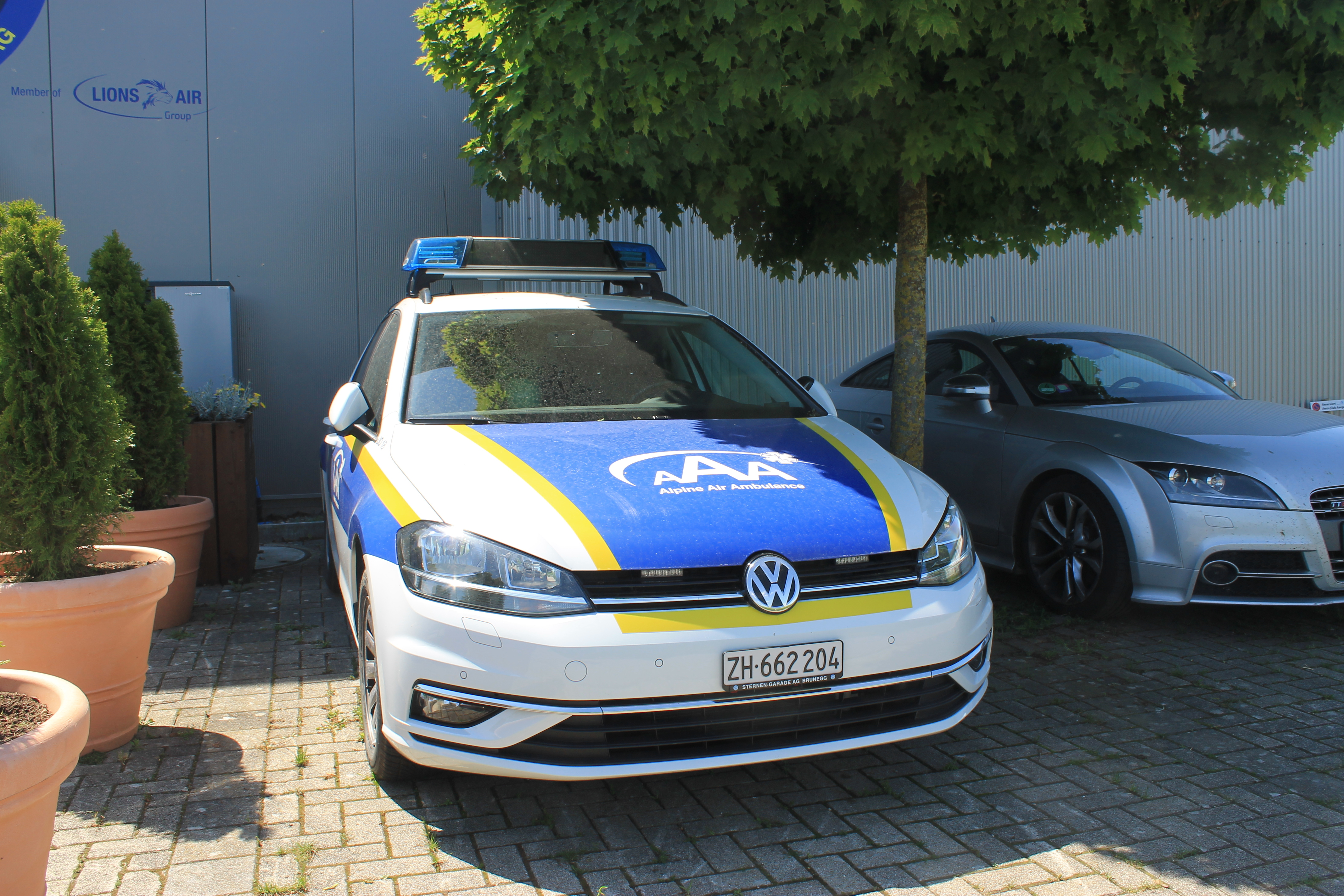 Einsatzfahrzeug der AAA Alphine Air Ambulance